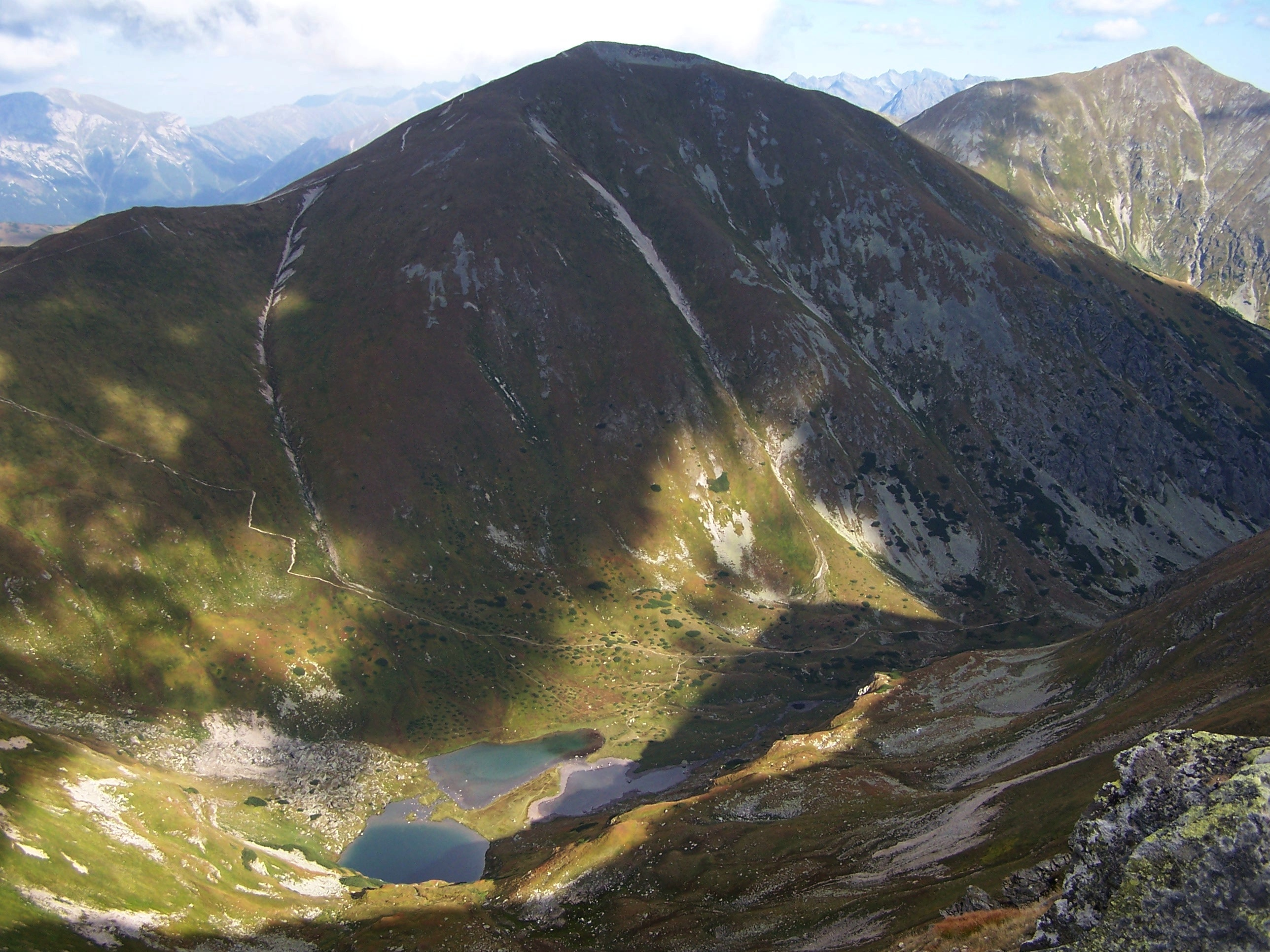 Starorobociański Wierch, Zadnia Dolina Raczkowa i Raczkowe Stawy. Po prawej stronie Starorobociańskiego widoczna Bystra